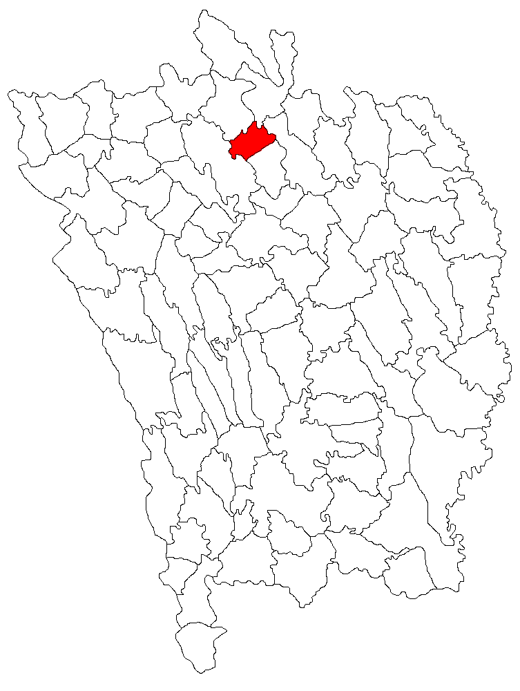 Categorie:Hărţi ale judeţului Vaslui